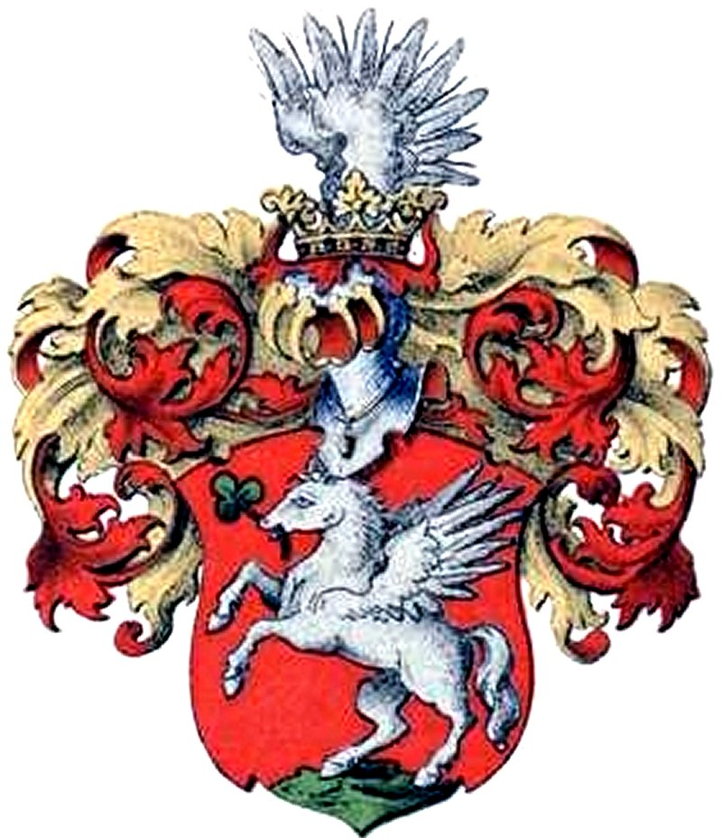 Bruiningki suguvõsa (Hellenurme) aadlivapp